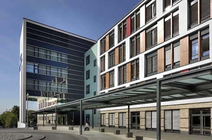 Universitätsklinikum Gießen und Marburg, Standort Gießen, Hauptgebäude, fertiggestellt als Bauabschnitt II im im April 2011